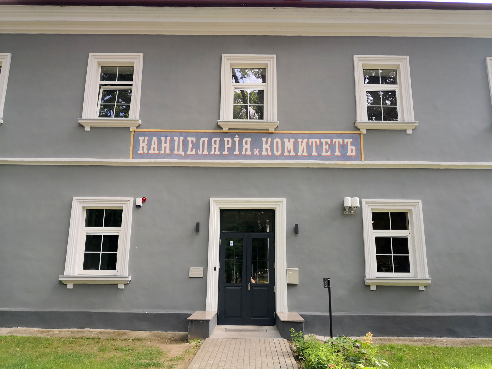 Restauruotas carinis XIX a. užrašas ant vieno iš Sapiegų parko pastatų. G. Kulikausko fotografija.